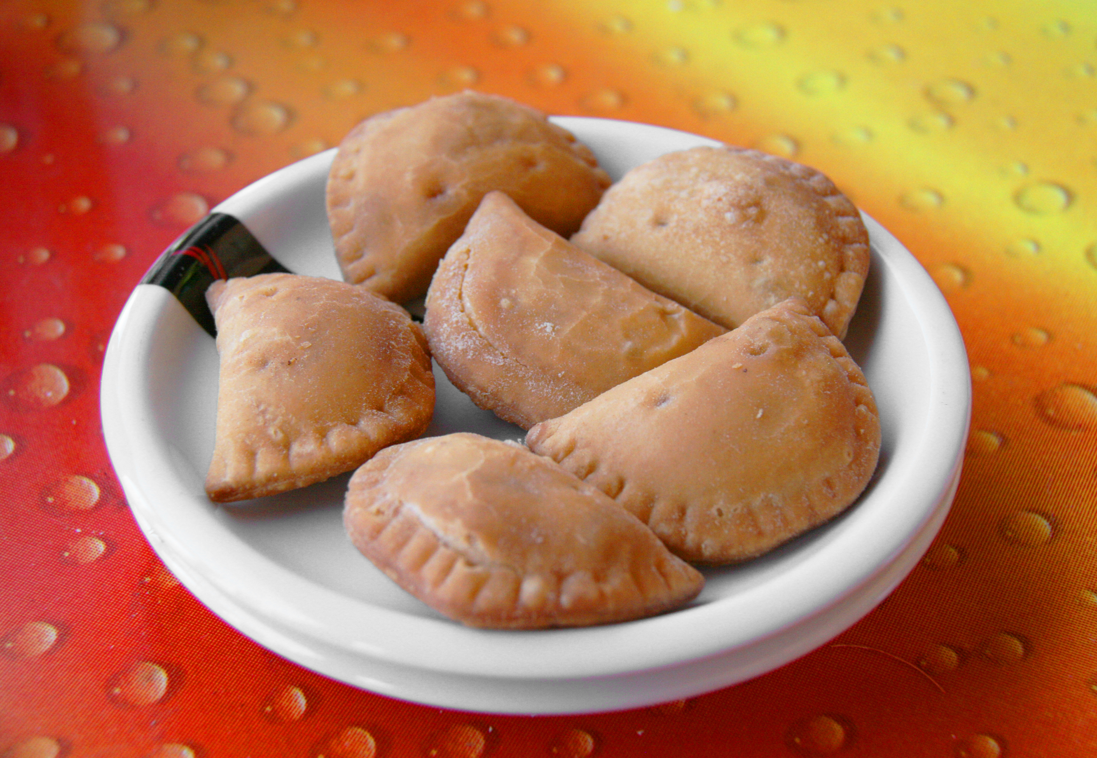 Tapas de empanadillas rellenas de atún y salsa de tomate con huevo cocido